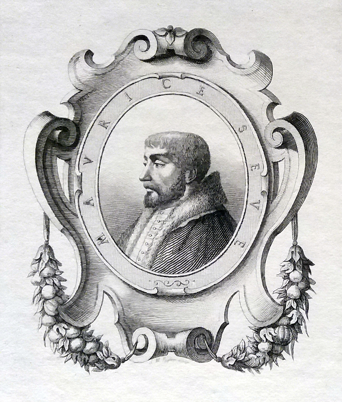 Maurice Scève, poète lyonnais. Gravé par Jean-Marie Fugère (1818-1882), chez l'imprimeur Eudes, XIXe siècle. Musées Gadagne. Inventaire 1324.10.